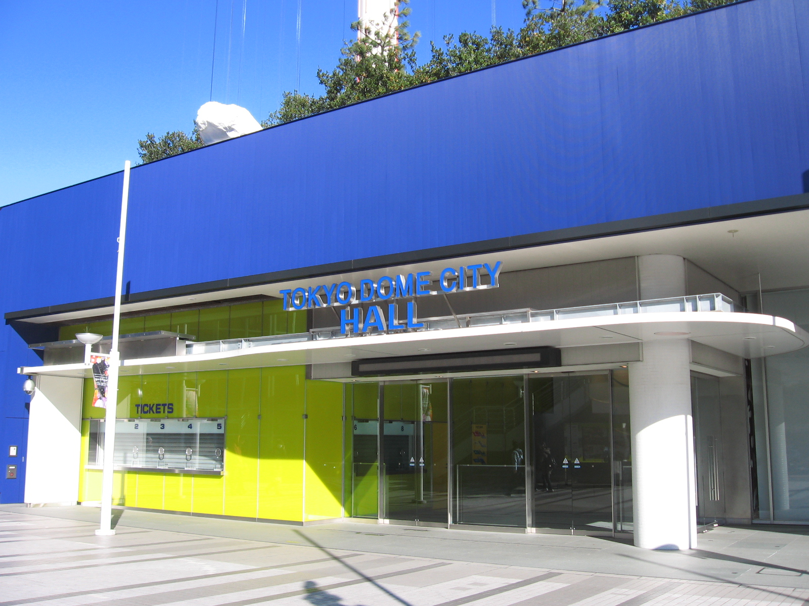 東京都文京区にある『TOKYO DOME CITY HALL』の正面入口。